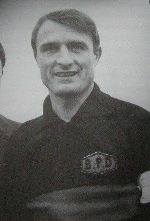 Andrea Caslini, ex calciatore, in questa foto con la maglia della B.P.D. Colleferro